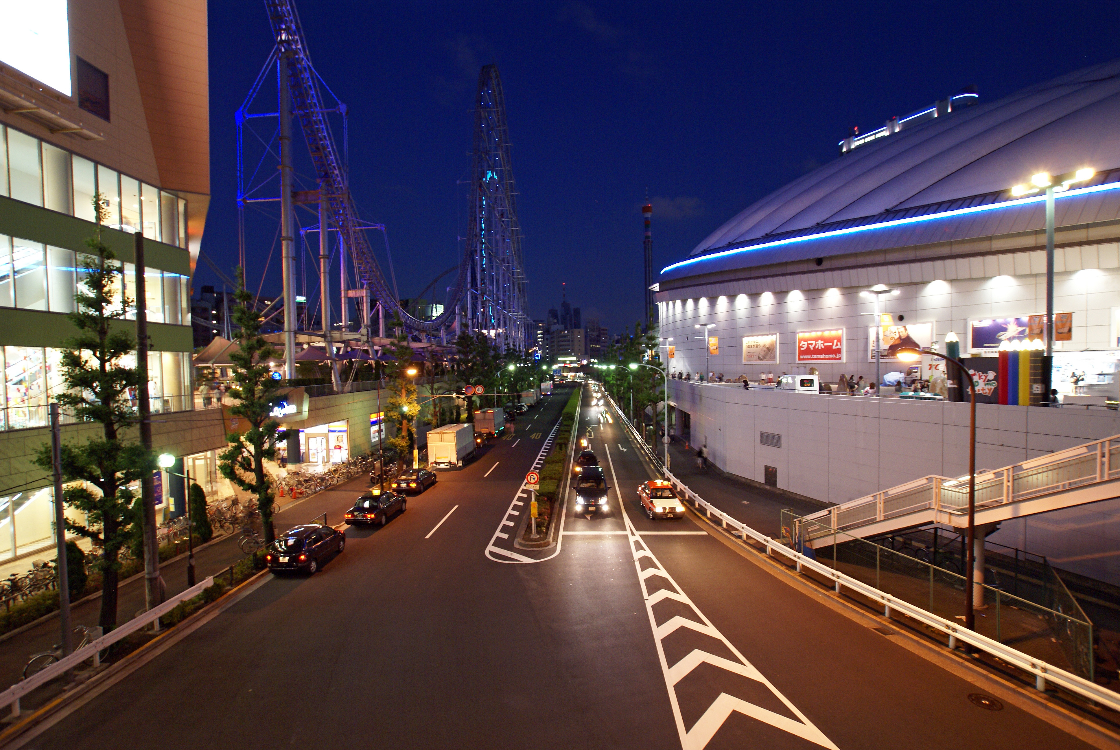 LaQua and Tokyo Dome in Bunkyo-ku, Tokyo, Japan